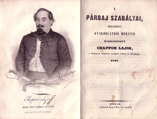 Chappon Lajos (1802–1878) A párbaj szabályai, mellyeket a gyakorlatból merítve összeszedett - a Budapesti nemzetőr seregnél vítanár és főhadnagy (Buda, 1848) című művének címlapja